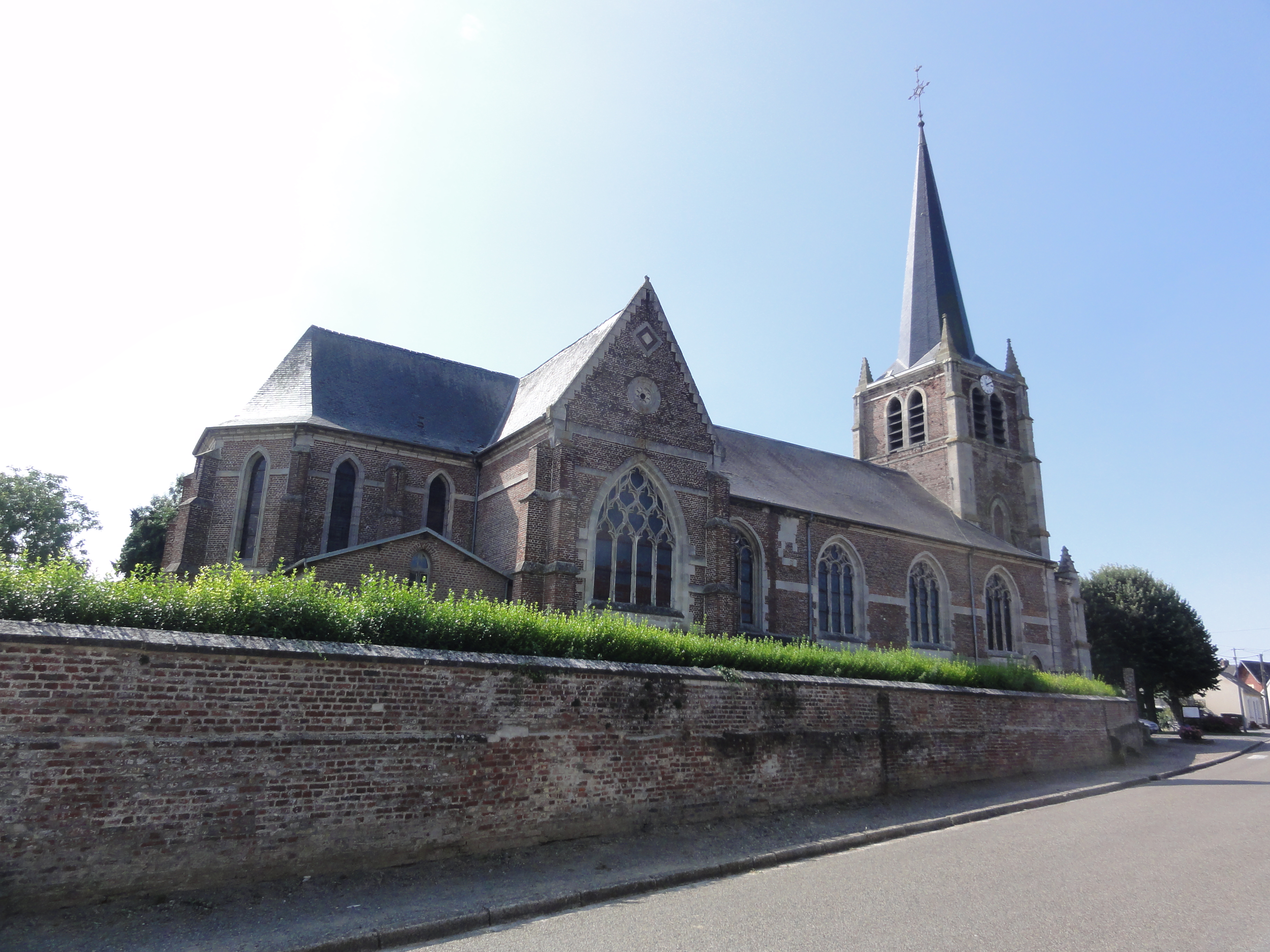 Villequier-Aumont (Aisne) église Saint-Martin